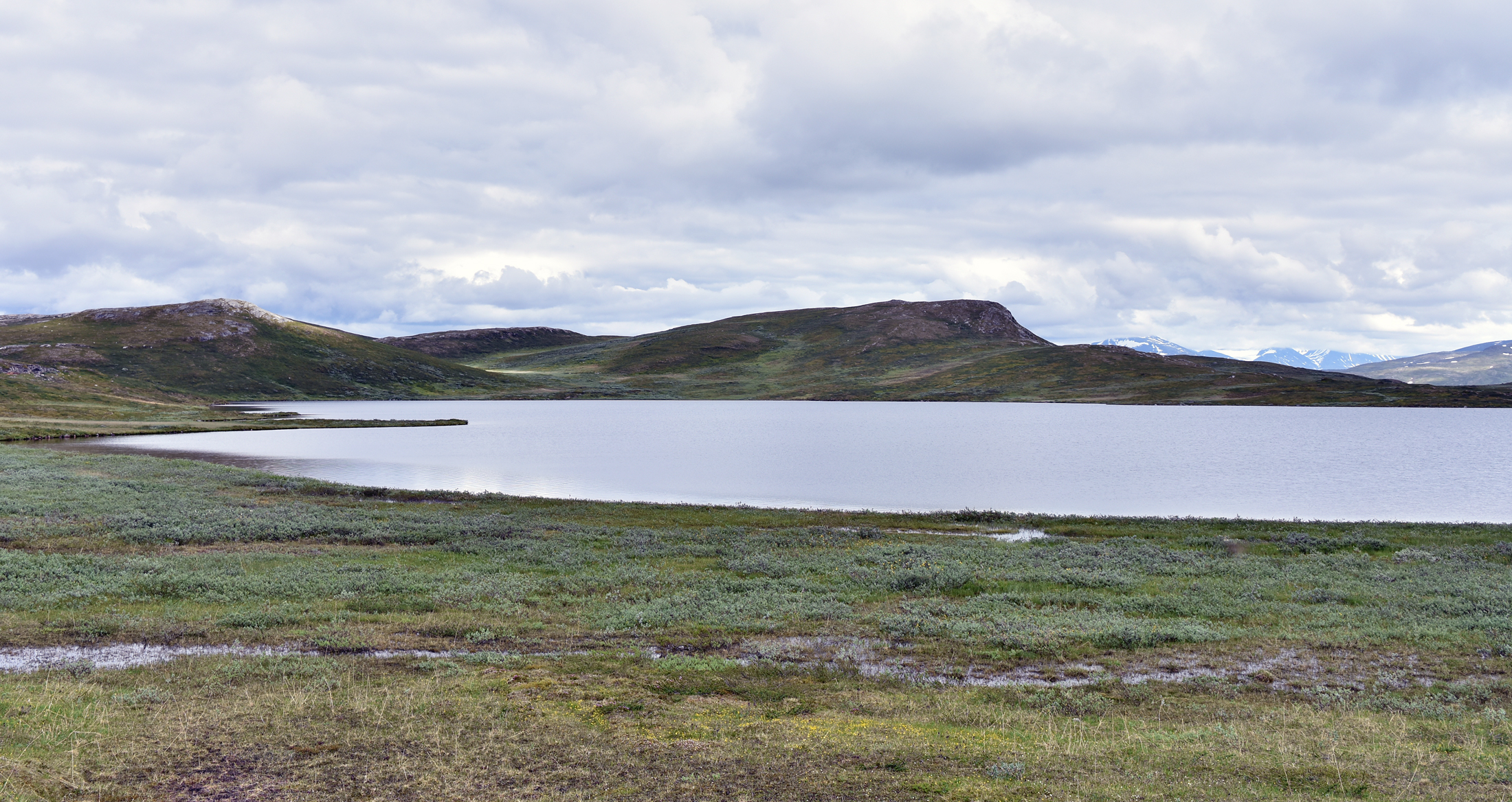 Vy mot Gievgesjávrásj från sjöns norra sida.